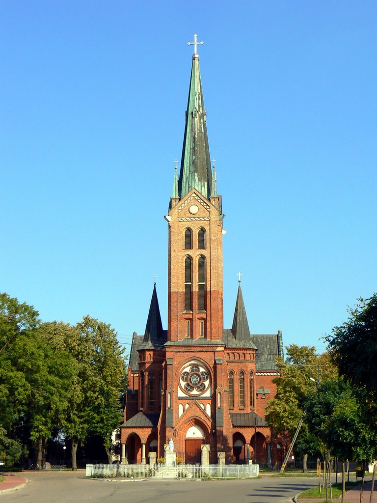 Kościół św. Stanisława Biskupa w Postoliskach, Mazowsze